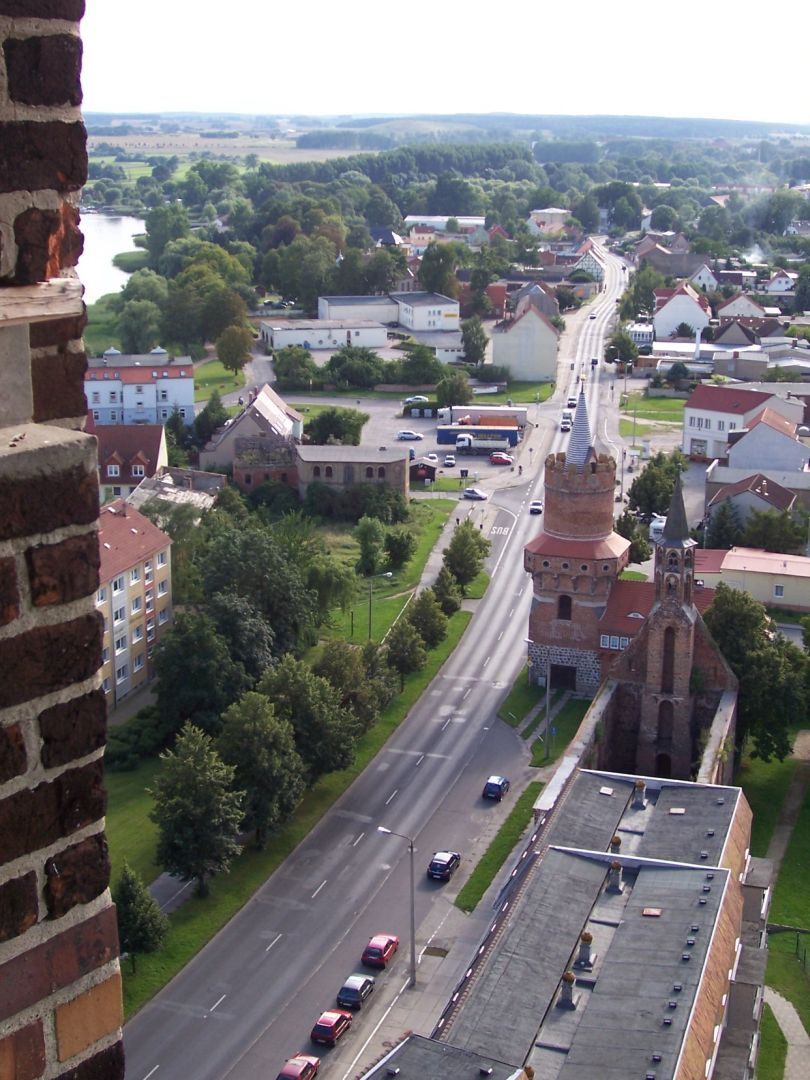 Blick von der Marienkirche in Prenzlau